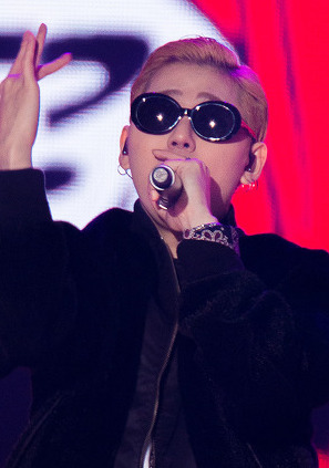 한국어 (조선): 20161119 지코 멜론뮤직어워드